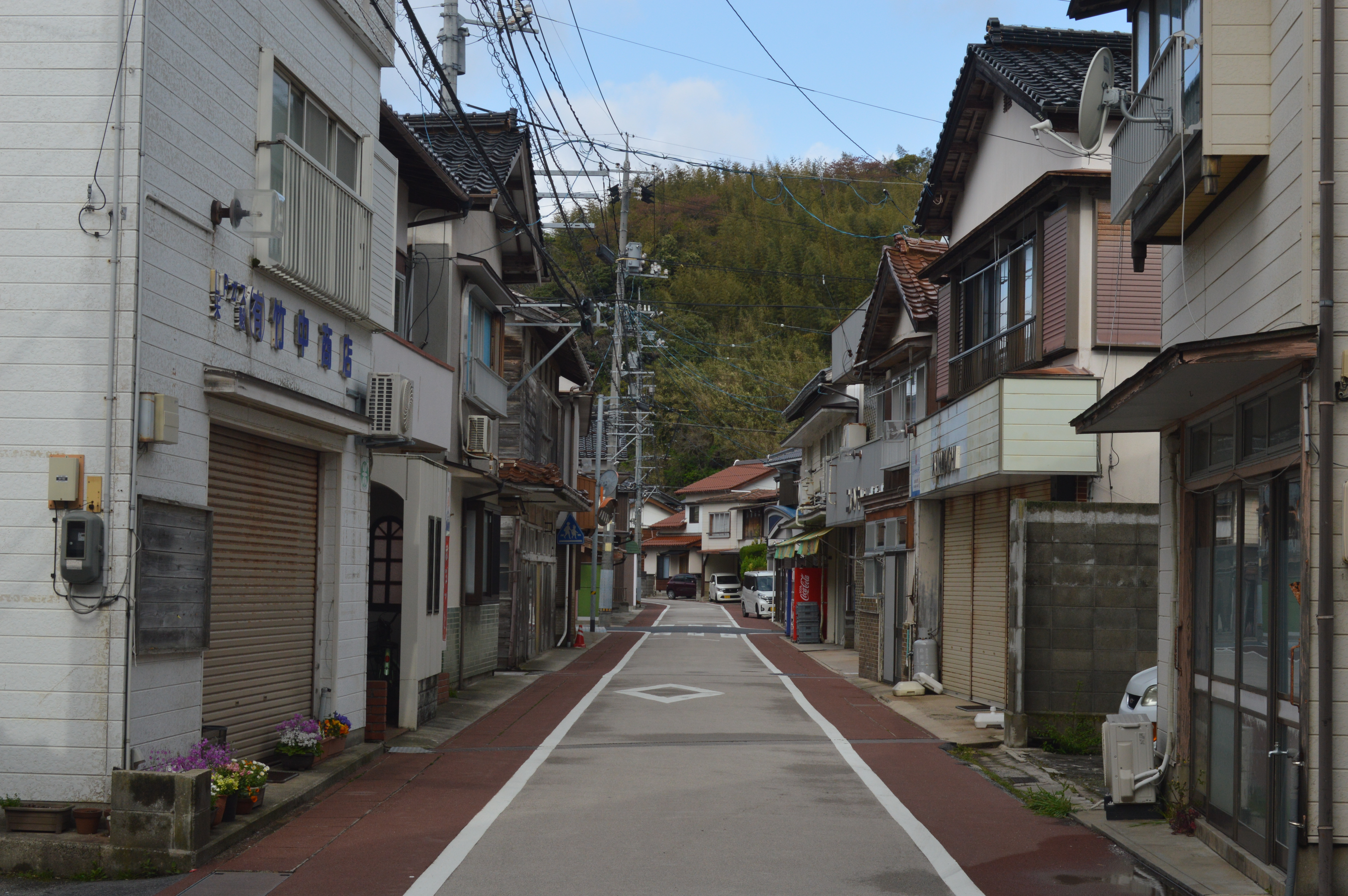 島根県隠岐郡西ノ島町浦郷。左手前は竹中商店。